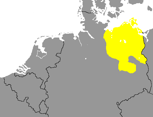 Beschreibung: Quelle: Bild selbst erstellt Datum: 21.01.2007 Autor: Andre Exeler